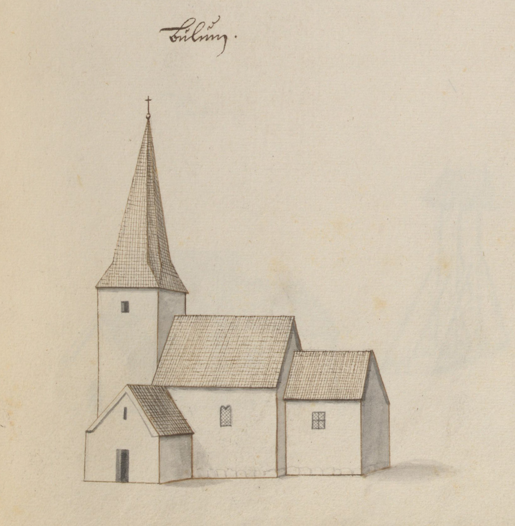 Bolums kyrkplats, teckning av Johan Peringskiöld ur hans skrift Monumenta (1710-talet).